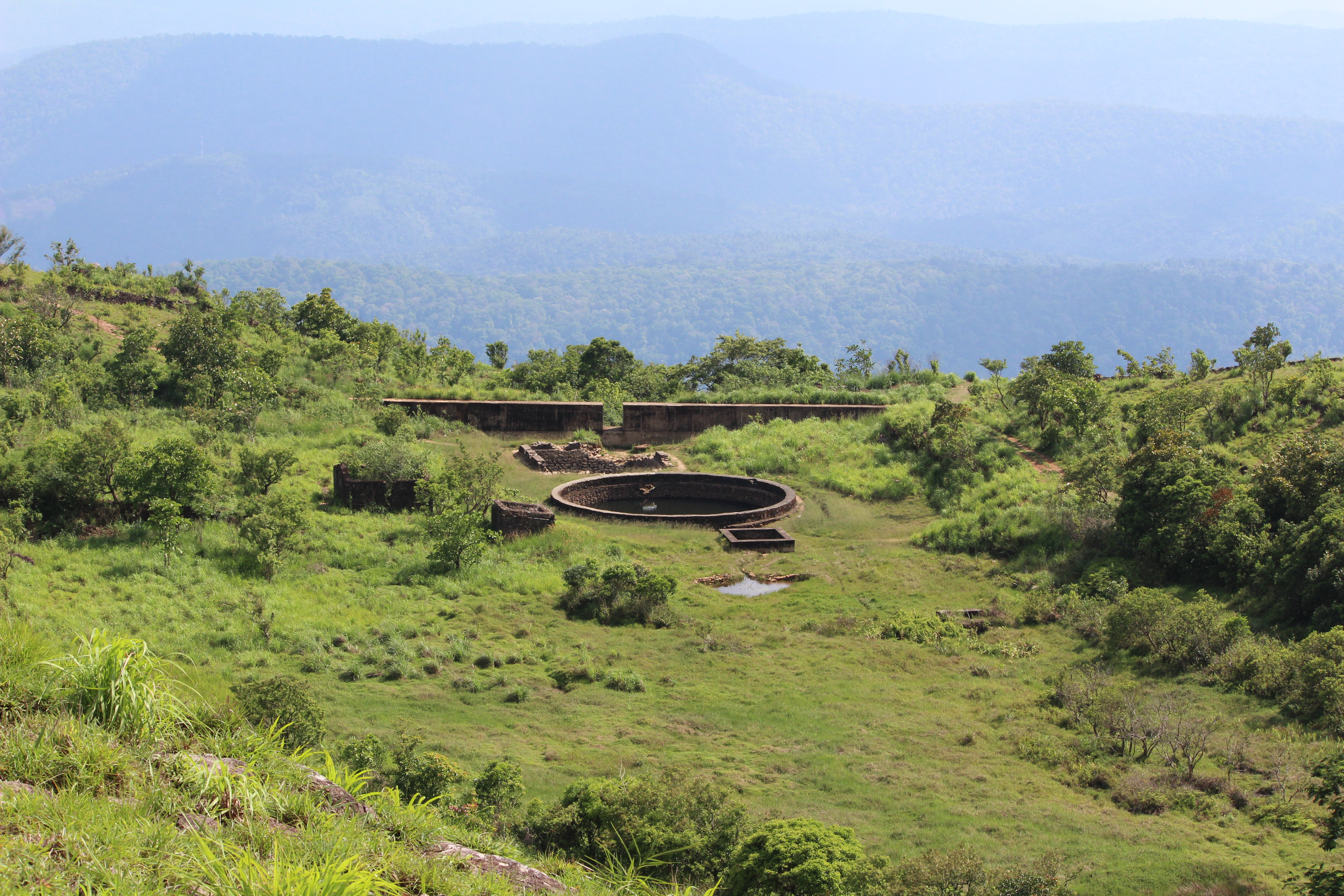 പാഞ്ചാലിമേട്ടിലെ തടയണ